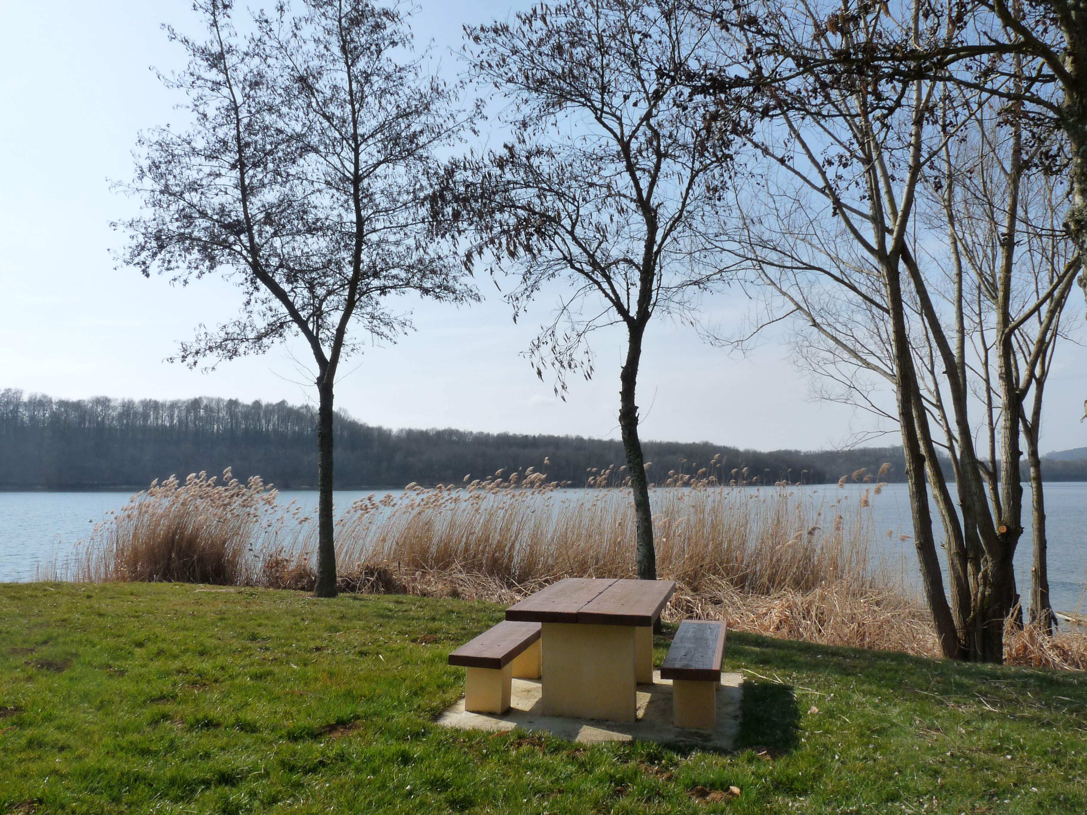 Lac de Charmes (Haute-Marne)